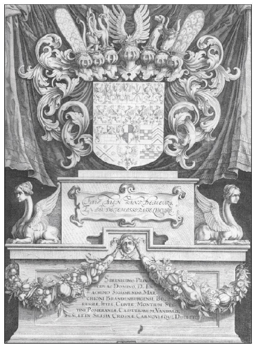 Для храброго сердца нет ничего невозможного